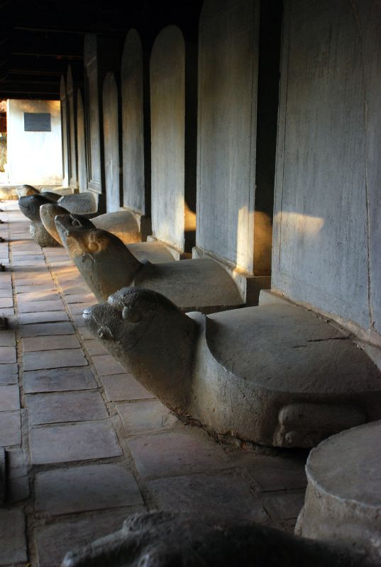 Văn Miếu, Nhà bia.